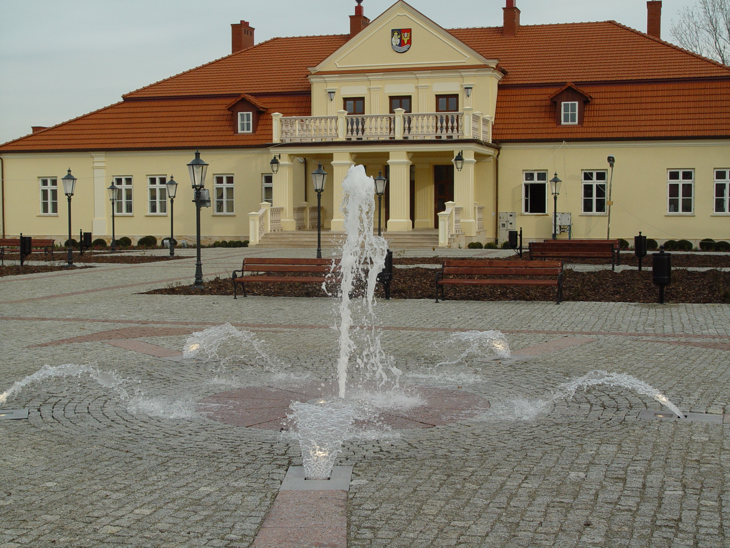 Dwór Starościński aktualnie Muzeum Ziemi Leżajskiej